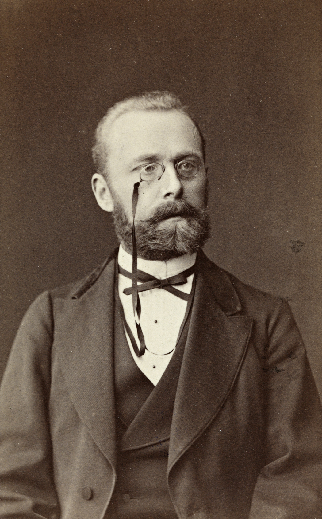 Tittel / Title: Portrett av Viggo Ullmann (1848-1910) Motiv / Motif: Visittkort. Viggo Ullmann var skolemann og politiker (V). Som bror av kvinnesaksforkjemperen og skolebestyrerinnen Ragna Nielsen (1845-1924) støttet han kvinnesaken fra ca. 1890 og gikk inn for kvinnelig stemmerett. Bildesignatur / Image Number: blds_05660